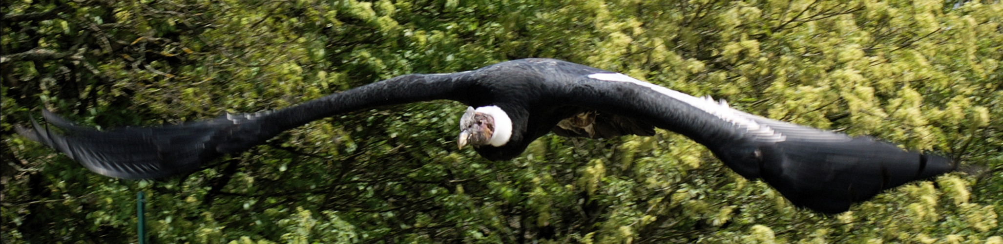 Condor des Andes en plein vol, envergure de 3 mètres environ.